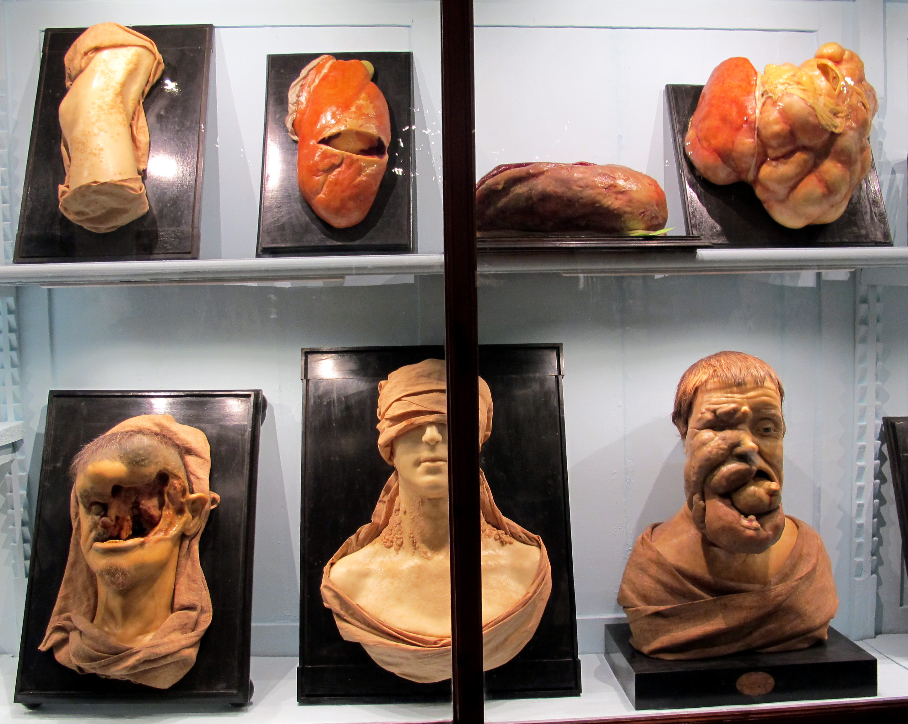 Istituto di anatomia patologica, museo, cere, vetrina